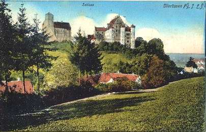 La bildo estas kopiita de de. La originala priskribo estas: PD AK Illertissen Schloss 1923